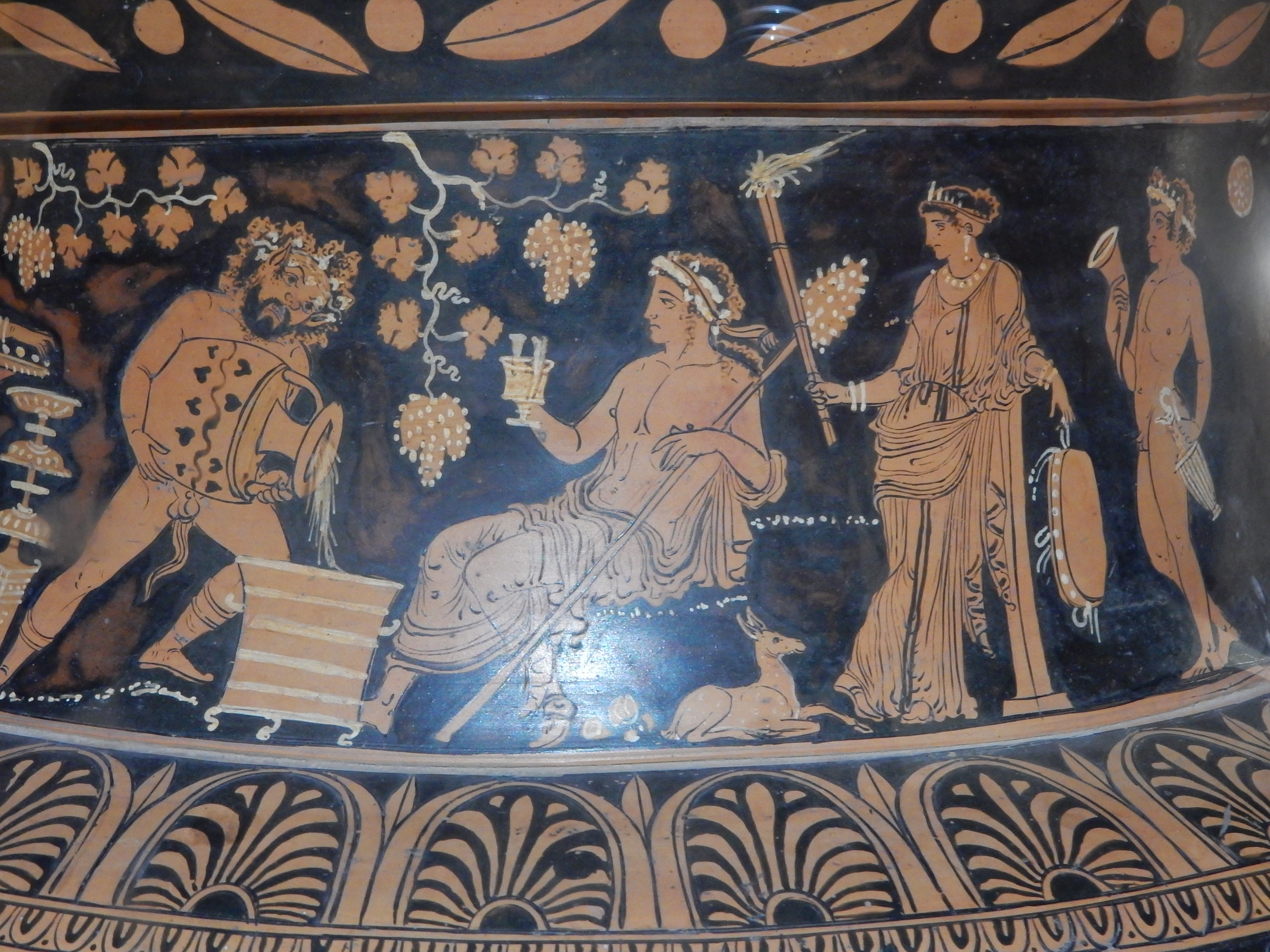 Ruvo Museo Nazionale Jatta 36 822. Exposition Mito e Natura, Naples, Museo Archeologico Nazionale, 2016.